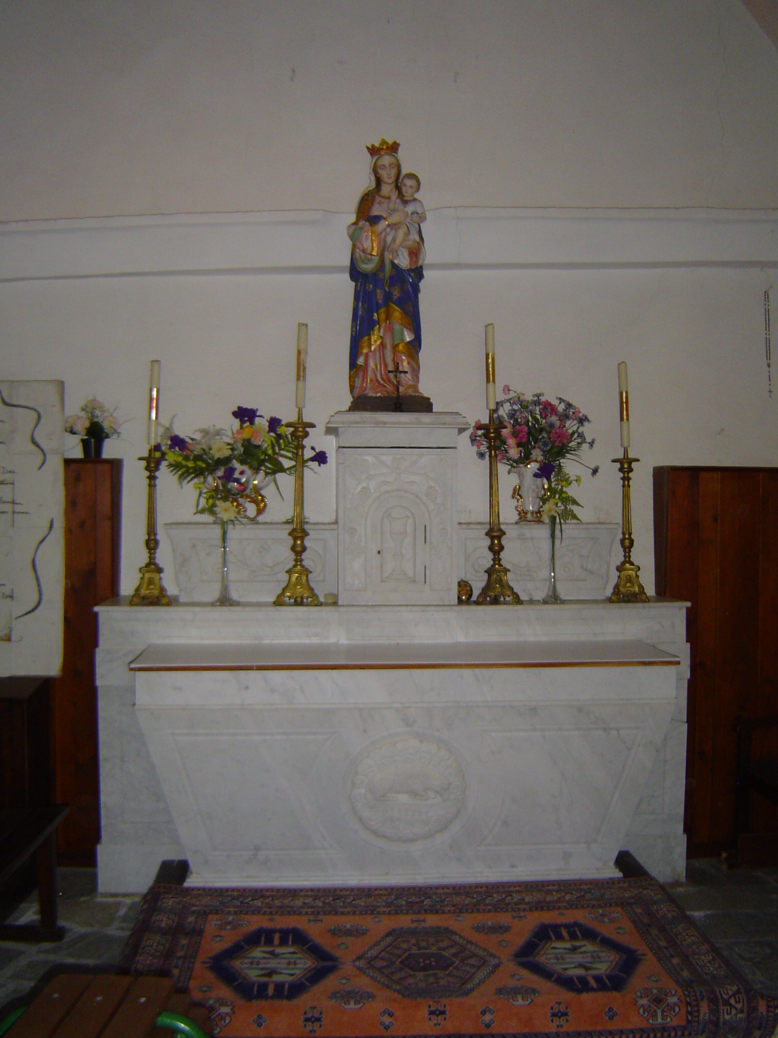 Vierge à l'enfant - Photo prise à Notre-Dame-du-Laus - Saint-Étienne-le-Laus (Hautes-Alpes)